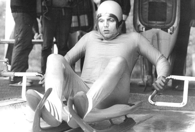 Michael Walter ADN-ZB Schaar 19.10.1984-Bez. Suhl: Saison-Auftakt der Rennschlittensportler-Start frei zum Handicap-Rennen für den 25jährigen Olypmpiavierten von Sarajevo, Michael Walter (SC Traktor Oberwiesenthal). Auf der Oberhofer Kunsteisbahn begann damit die neue Saison im Rennschlittensport. Höhepunkt sind auf gleicher Bahn Ende Januar die Weltmeisterschaften 1985.